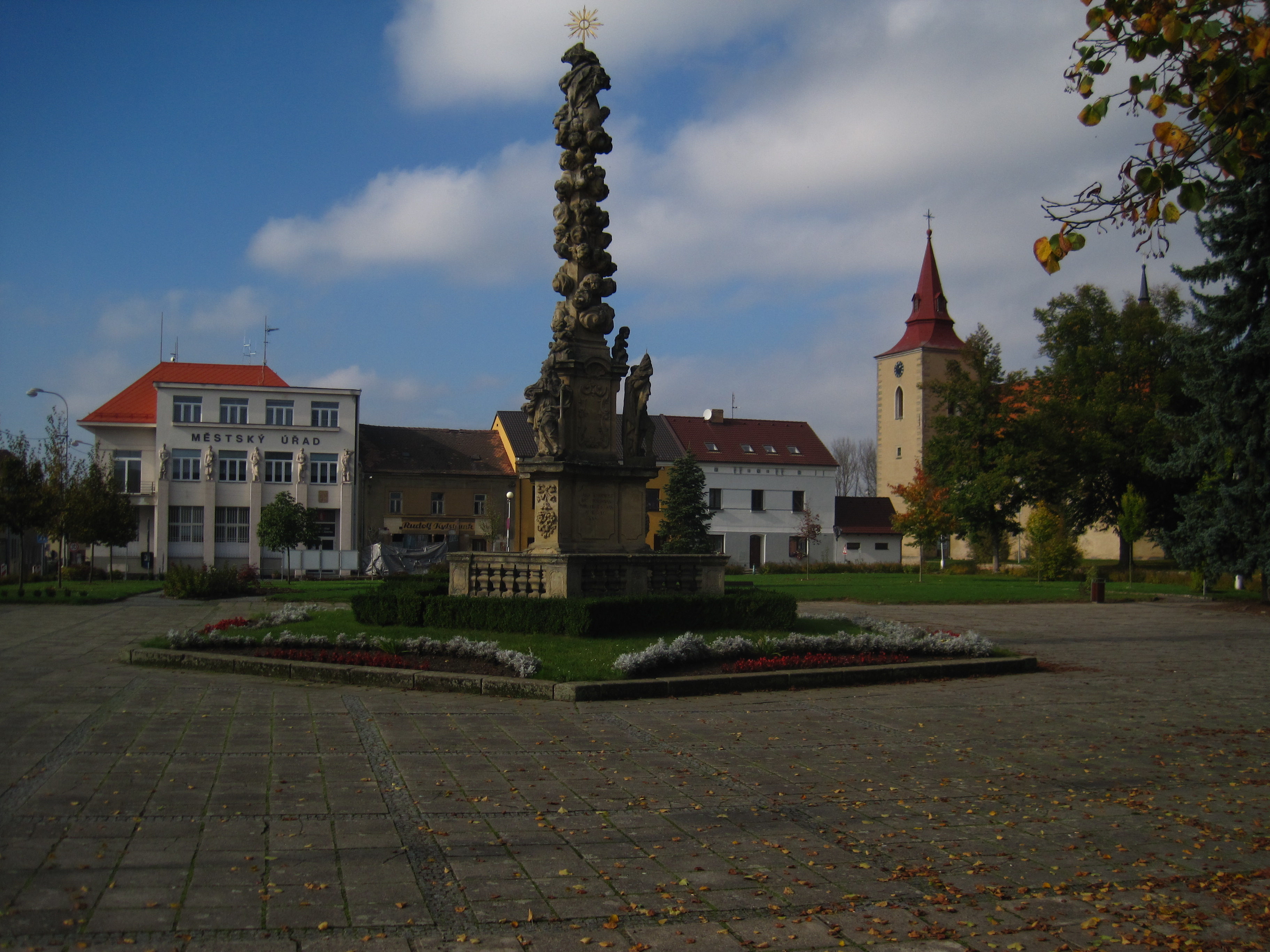 Bakov nad Jizerou - Mírové náměstí